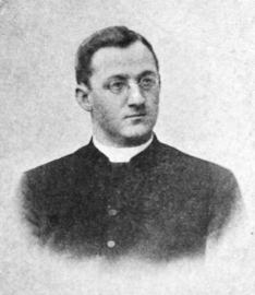 Hornjoserbsce: Michał Šewčik (1870–1903); serbski farar, stawiznar a publicist.